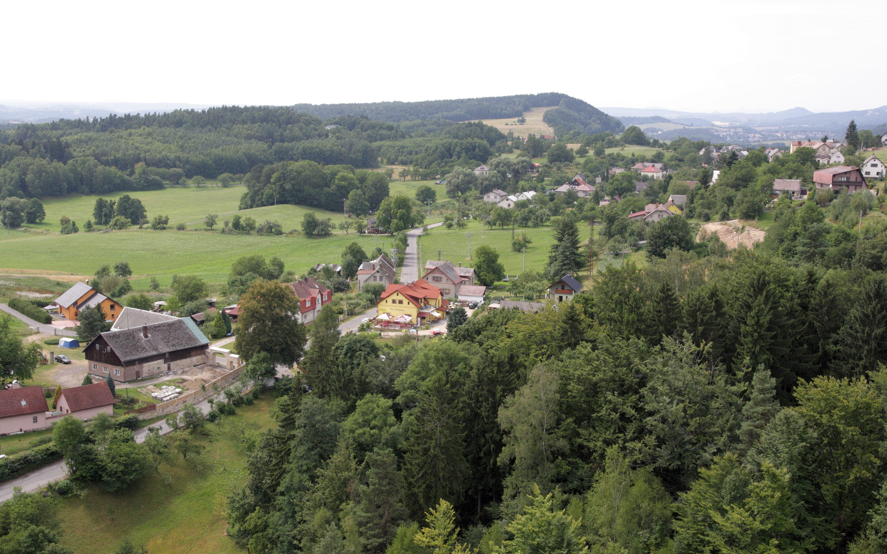 Frýdštejn - pohled z hradní věže, vzadu Zabolky.